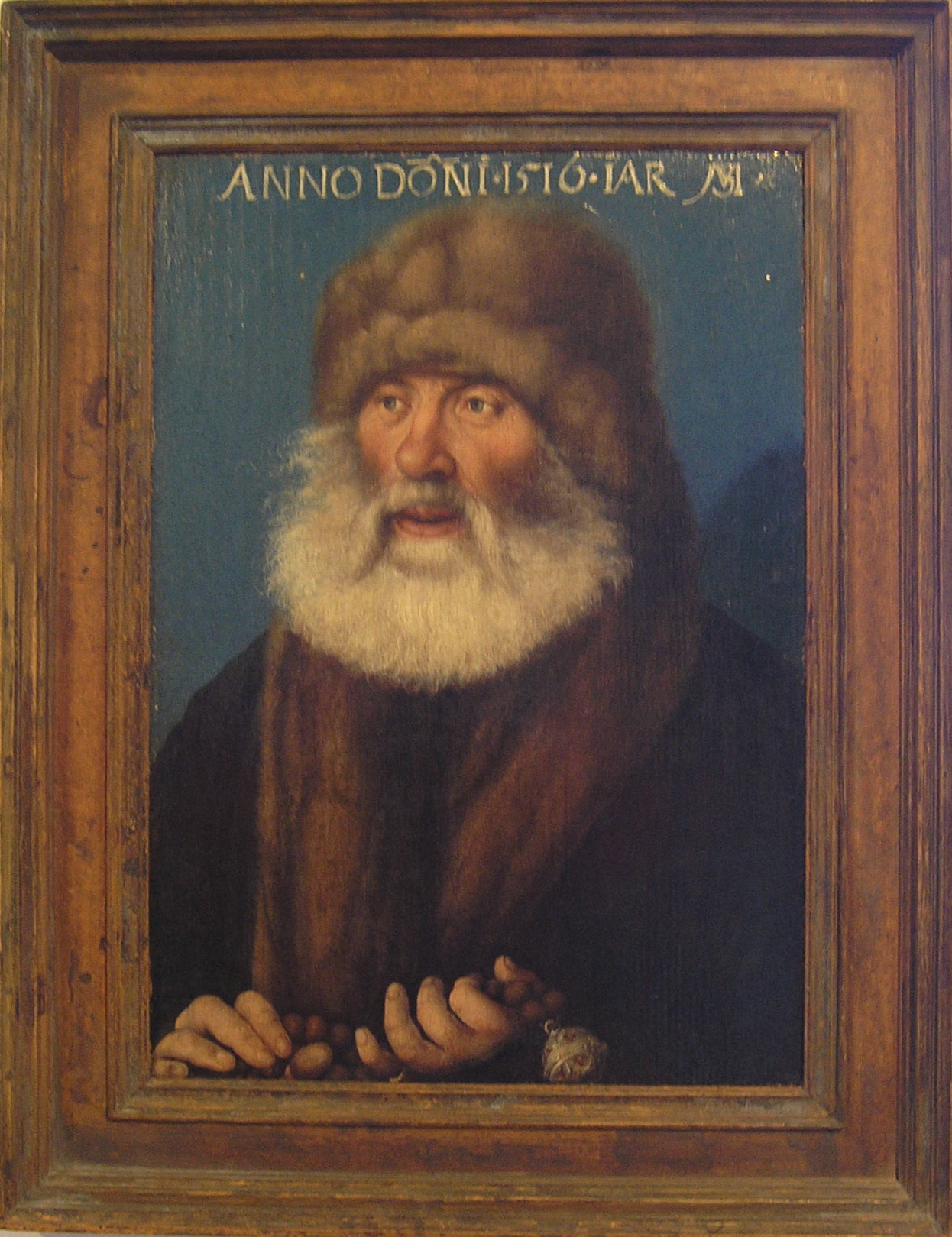 Bildnis des Eitel Besserer, datiert 1516. Eitel Besserer zu Rohr (1450-1533) war seit 1511 Ulmer Ratsherr und wurde 1520 von Karl V. mit dem Besitz in Beuren belehnt. Das Porträt gelangte aus dem Besitz des Majors von Schad in die Besserer Kapelle im Ulmer Münster, von dort 1940 in das Ulmer Museum.